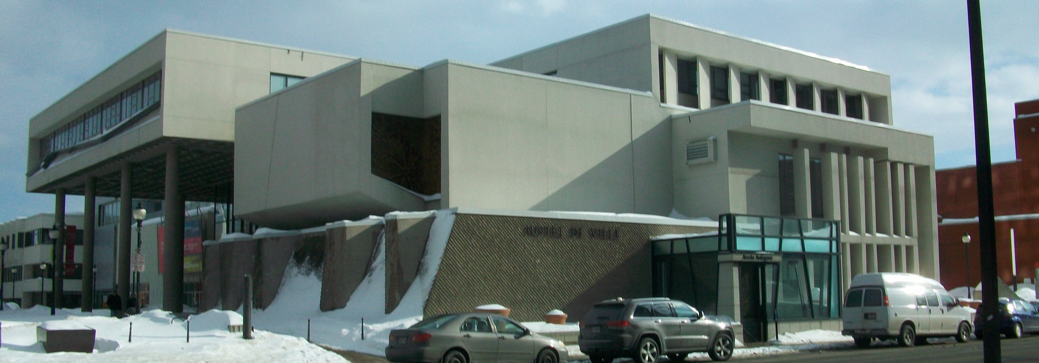 Hotel de ville - Trois-Rivières